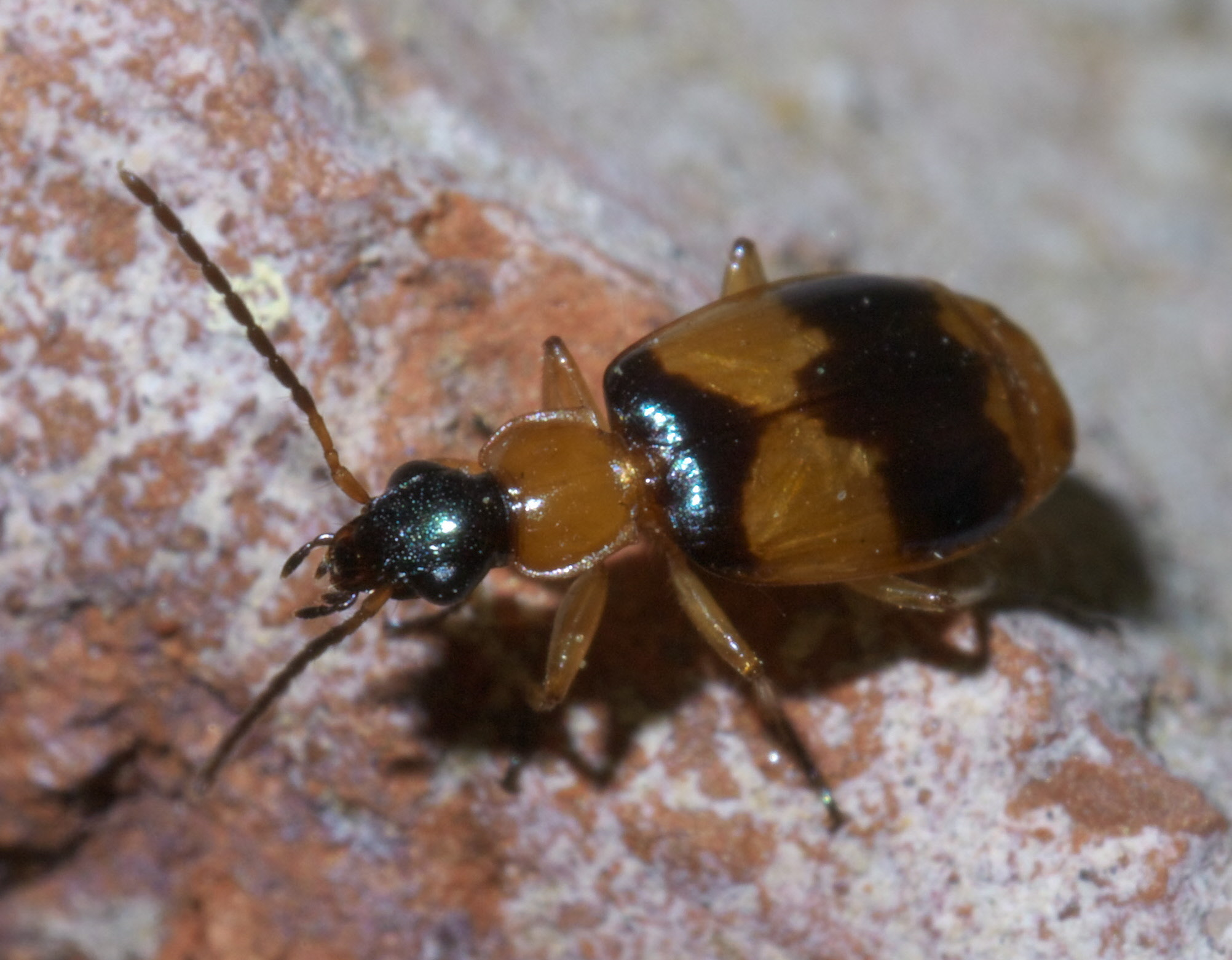 Lebia pulchella, Beautiful Banded Lebia, ID Confidence: 88